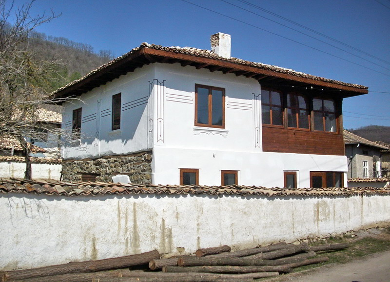 Обновена стара селска къща